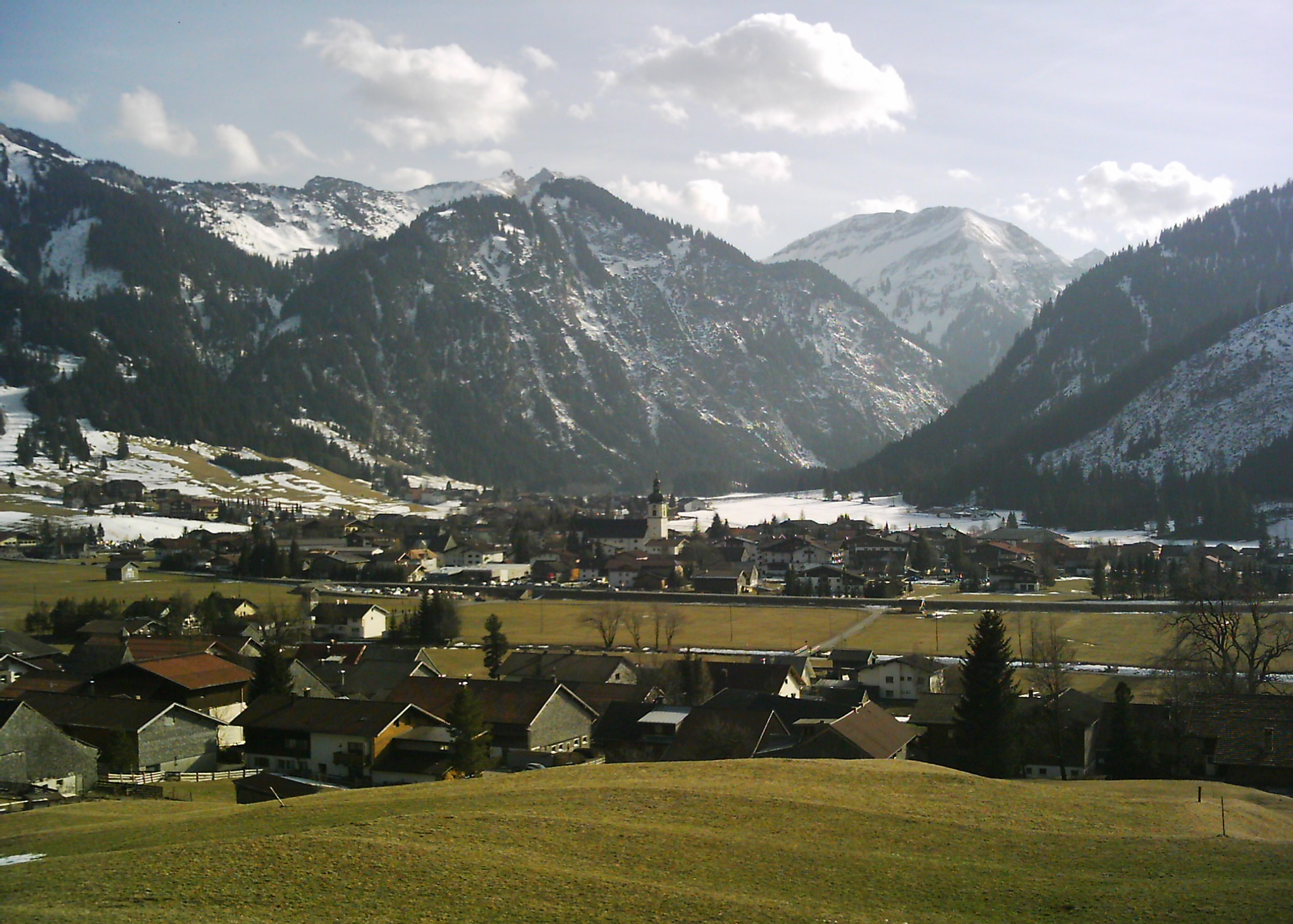 St. Nikolaus in Tannheim (Tirol). Die Kirche steht im Tannheimer Tal. Das Tannheimer Tal liegt in der nordwestlichsten Ecke des Österreichischen Bundeslandes Tirol